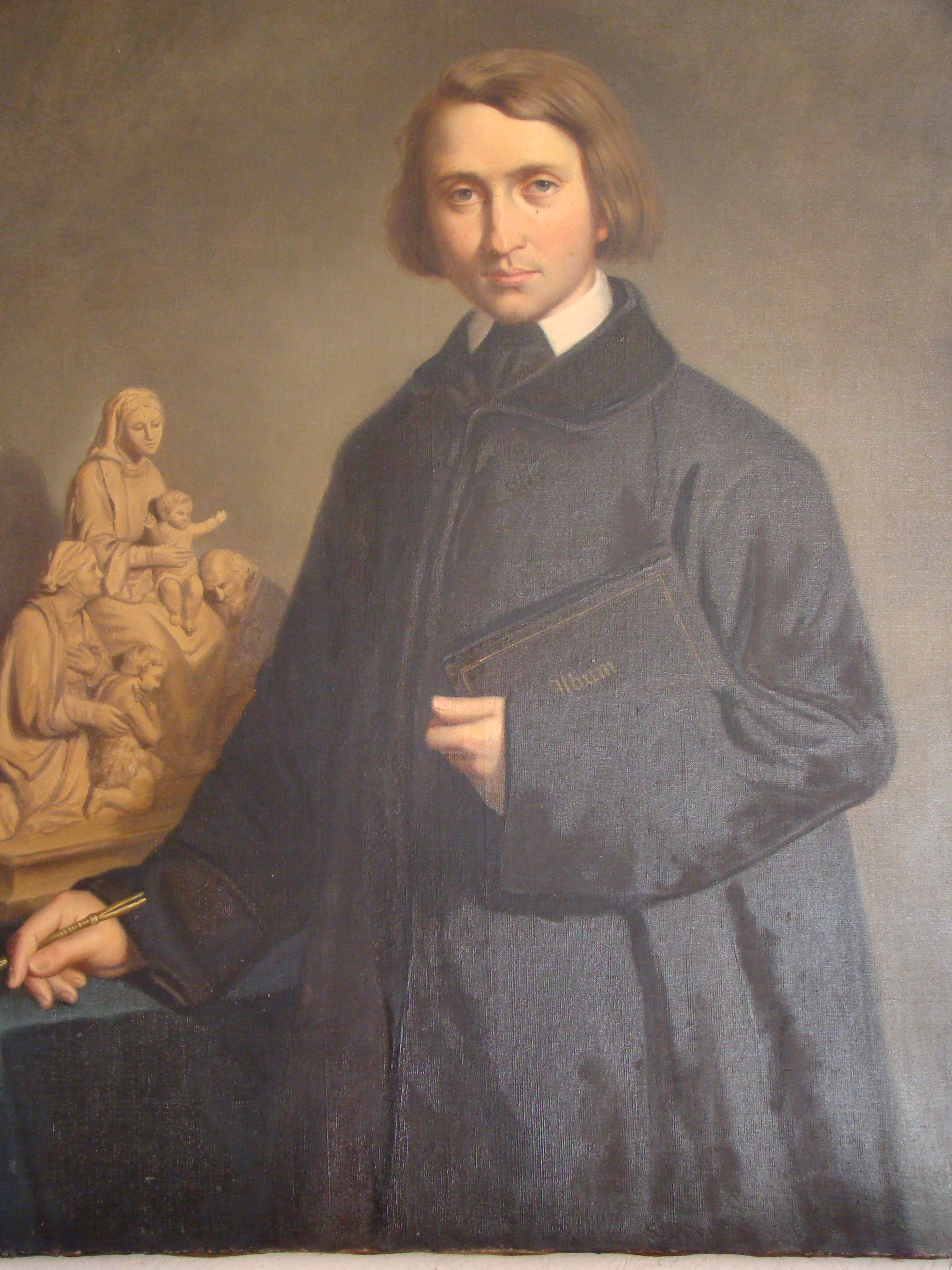 Attribué à Léon Brune, Portrait présumé de Jean-Marie Valentin (vers 1870), localisation inconnue.